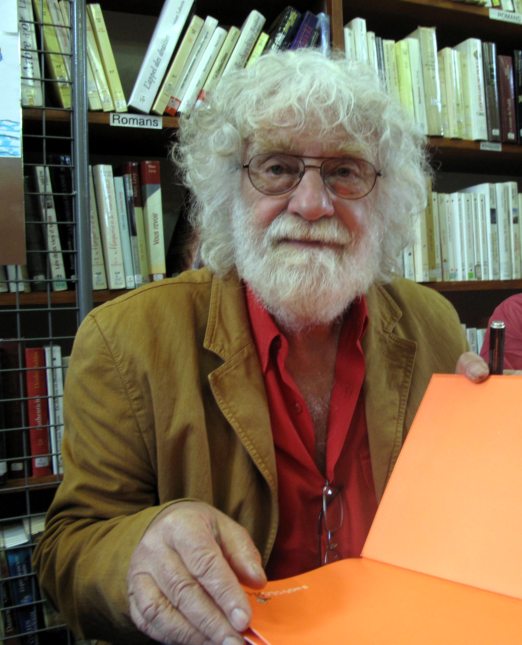 Pierre Elie Ferrier